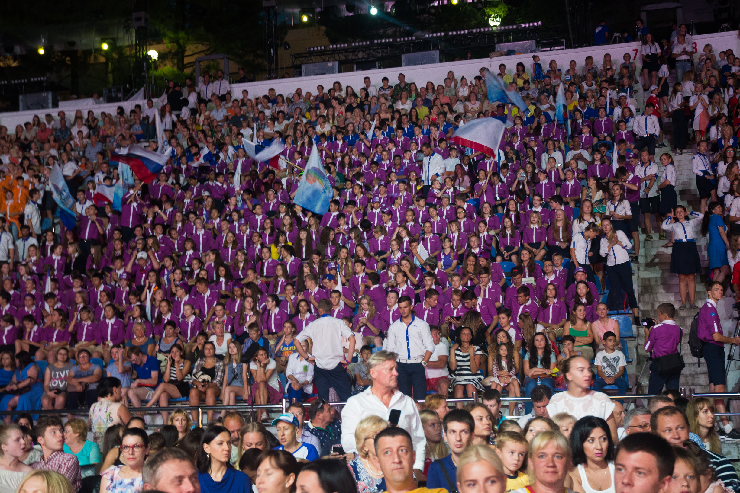 Артековцы на Детской Новой волне 2016